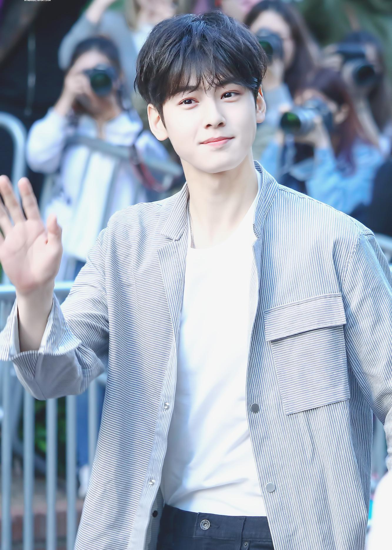 170602 뮤직뱅크 출근길